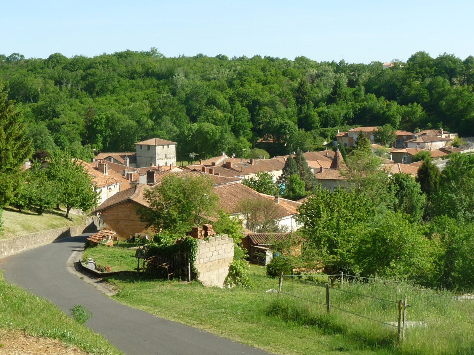 vue de Vitrac-St-Vincent, Charente, France